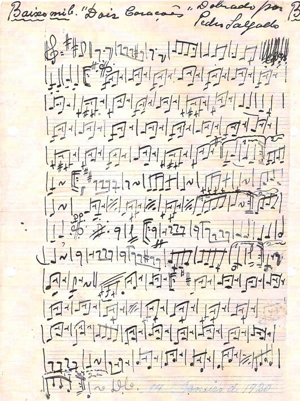 Manuscrito Dobrado Dois Corações Pedro Saçgado